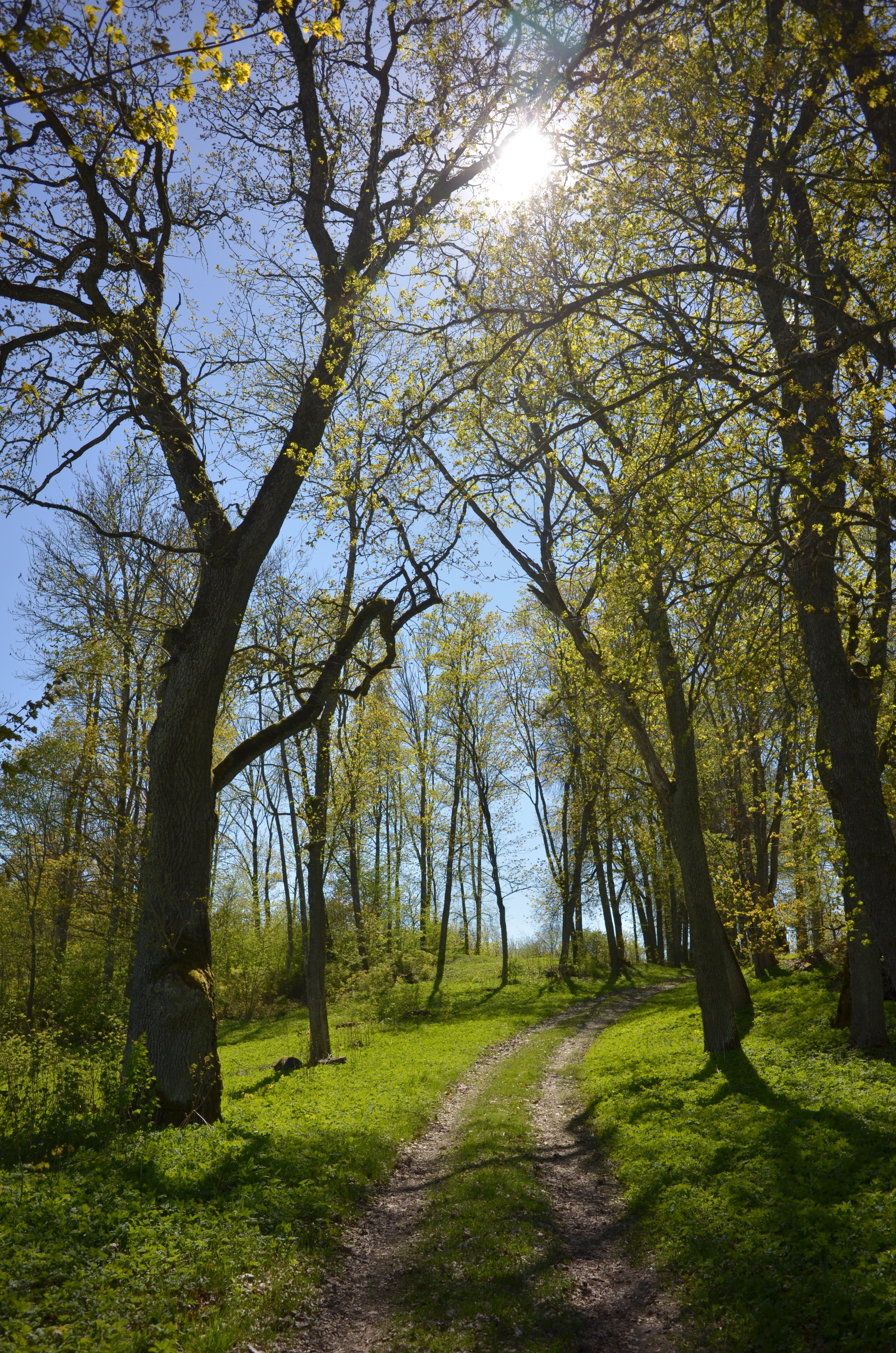 Kaiavere mõisa park